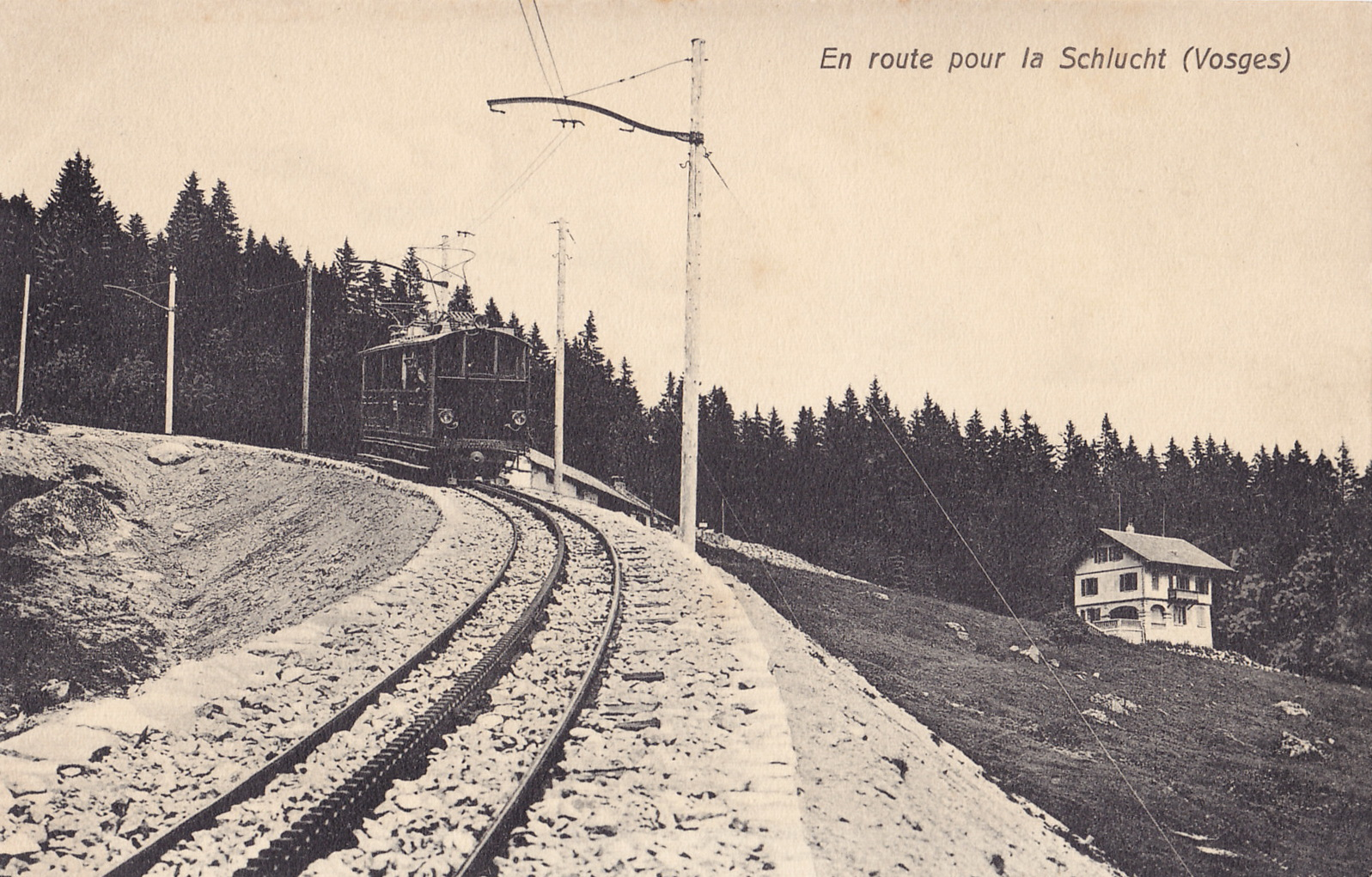 Carte postale ancienne sans mention d'éditeur, n°C70-11 : En route pour la Schlucht